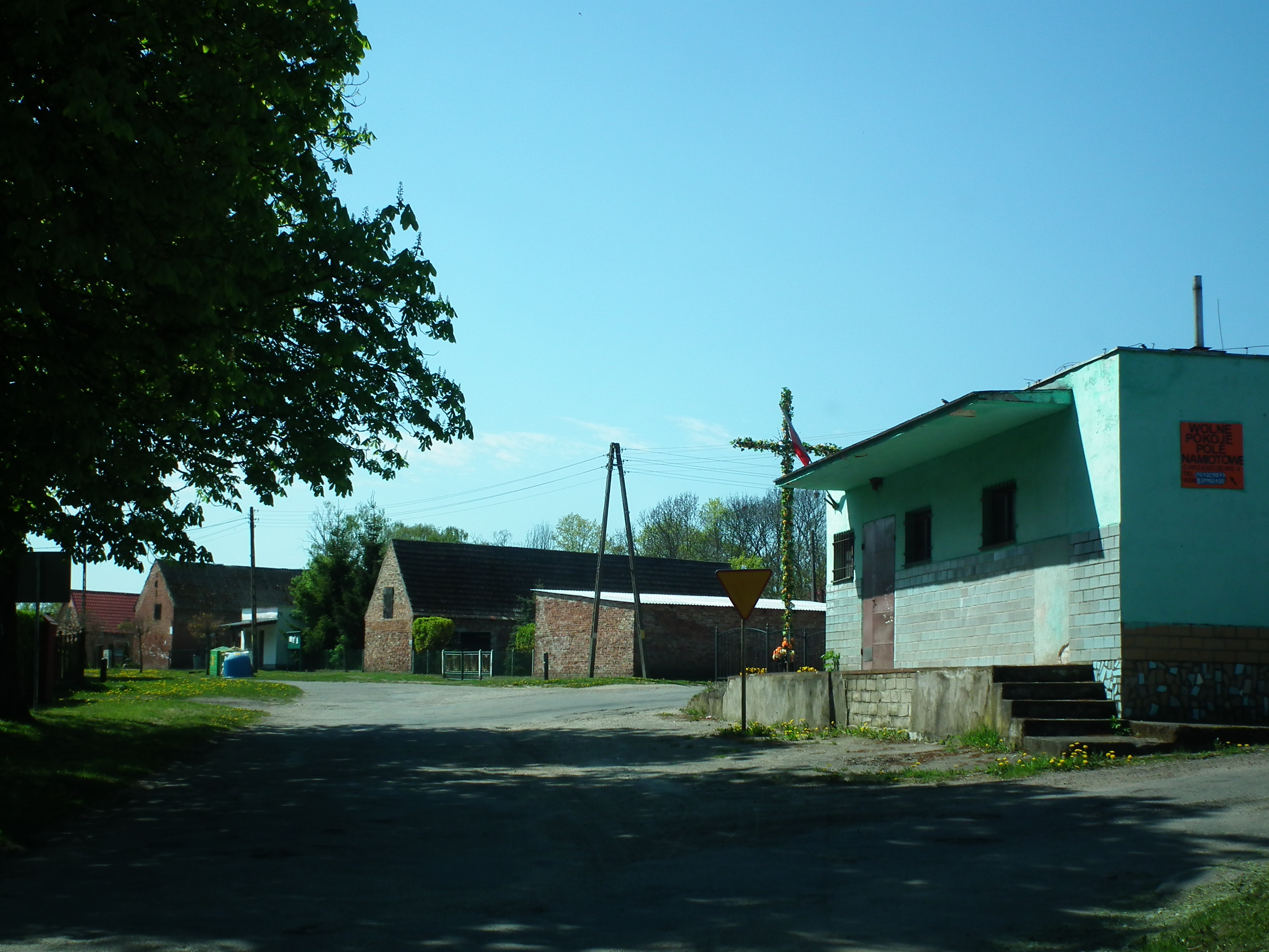 Chrząszczewo na Wyspie Chrząszczewskiej.